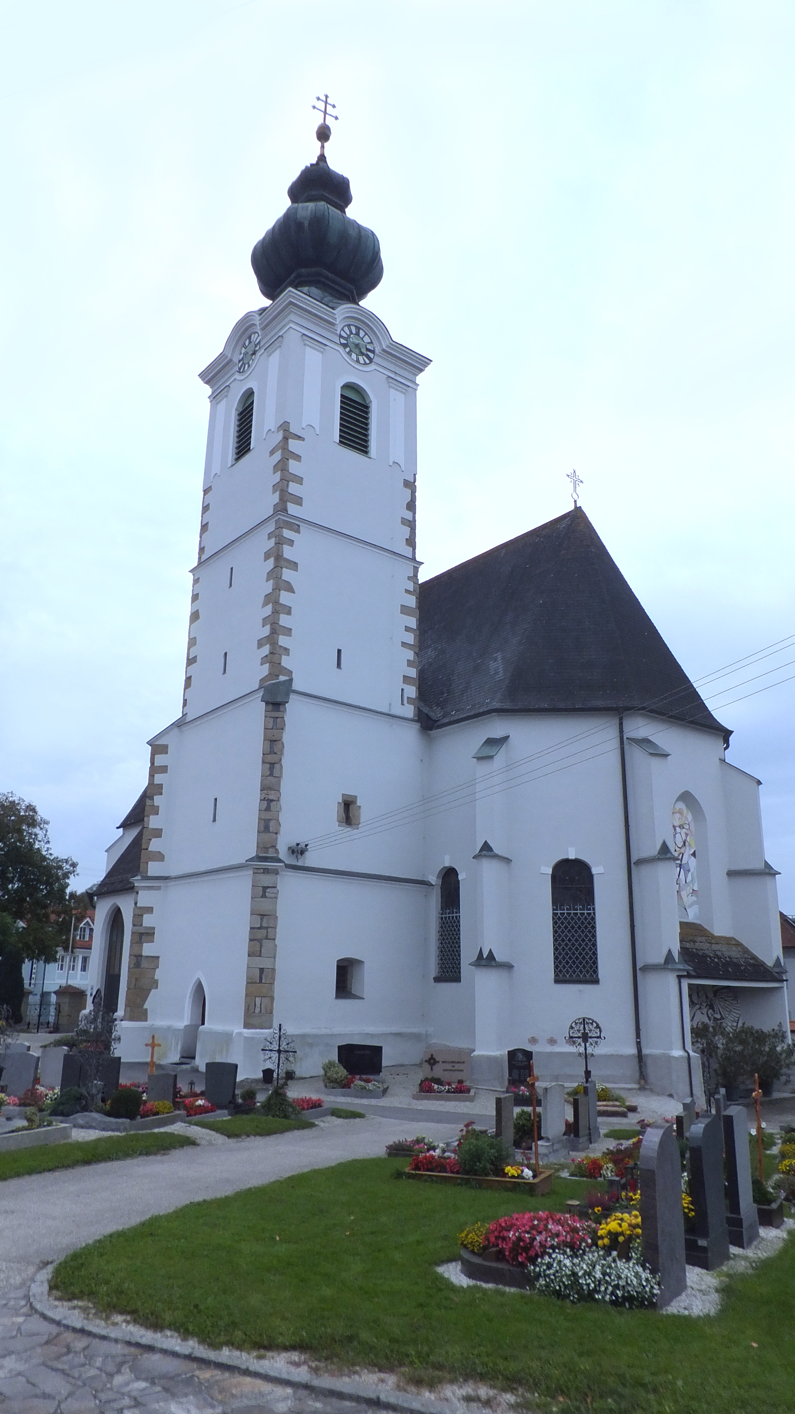 Kath. Pfarrkirche hl. Stefan, Weibern